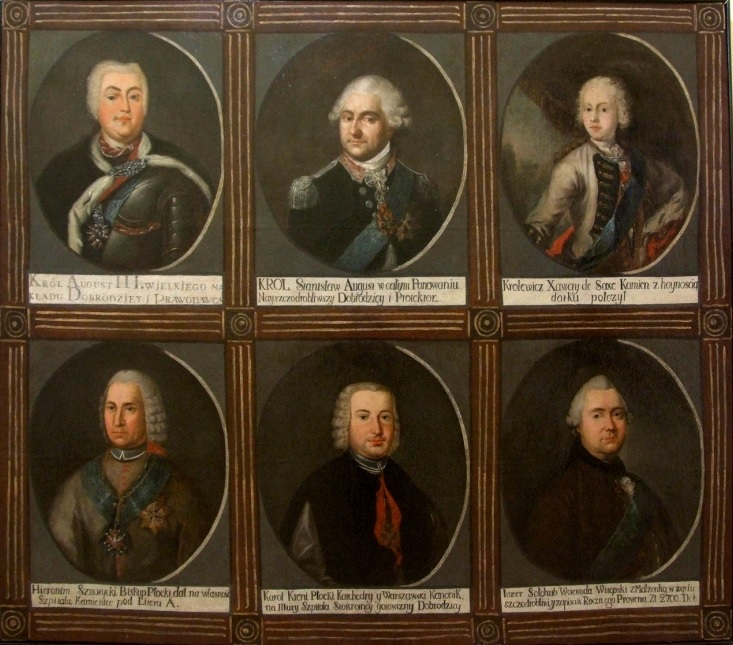 Portrety darczyńców Szpitala Dzieciątka Jezus. August III, Stanisław August Poniatowski, Franciszek Ksawery Saski, biskup płocki Hieronim Szeptycki, kanonik warszawski Karol Kreni, wojewoda witebski Józef Sołłohub